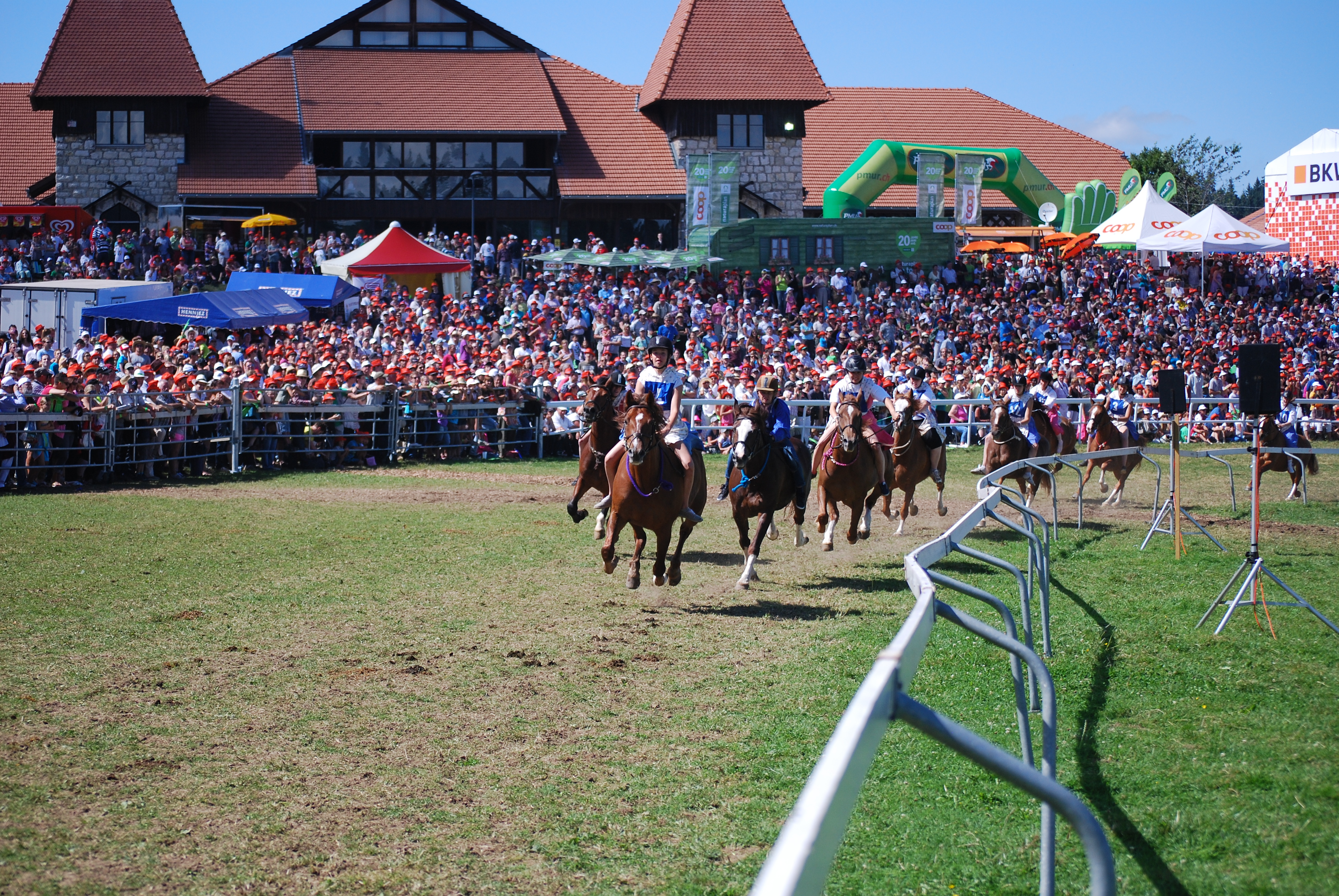 Eine Disziplin der ländlichen Pferderennen am Marché-Concours mit jungen Reitern. Die Freiberger-Pferde werden ohne Sattel und Steigbügel geritten.